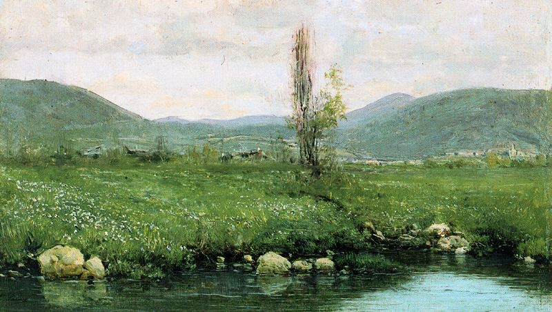 Casimiro Sáinz Sanz (1853-1898): paisajista santanderino (Cantabria, España) con una destacable obra de paisajes y realismo costumbrista. Bibliografía: Casimiro Sáinz Sanz en el C.E.M.